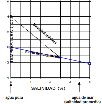 punto de congelación